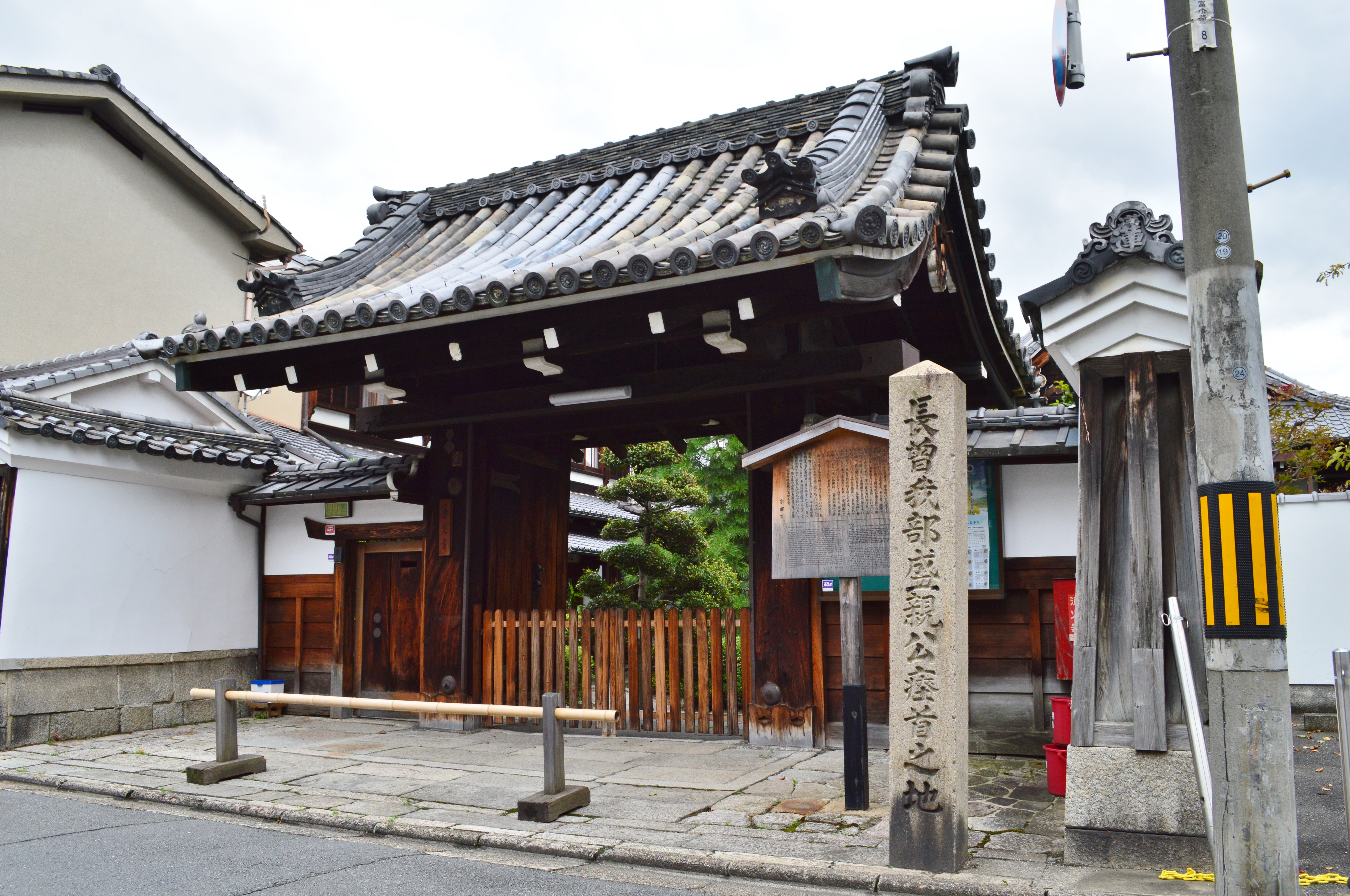 蓮光寺 (京都市) 山門